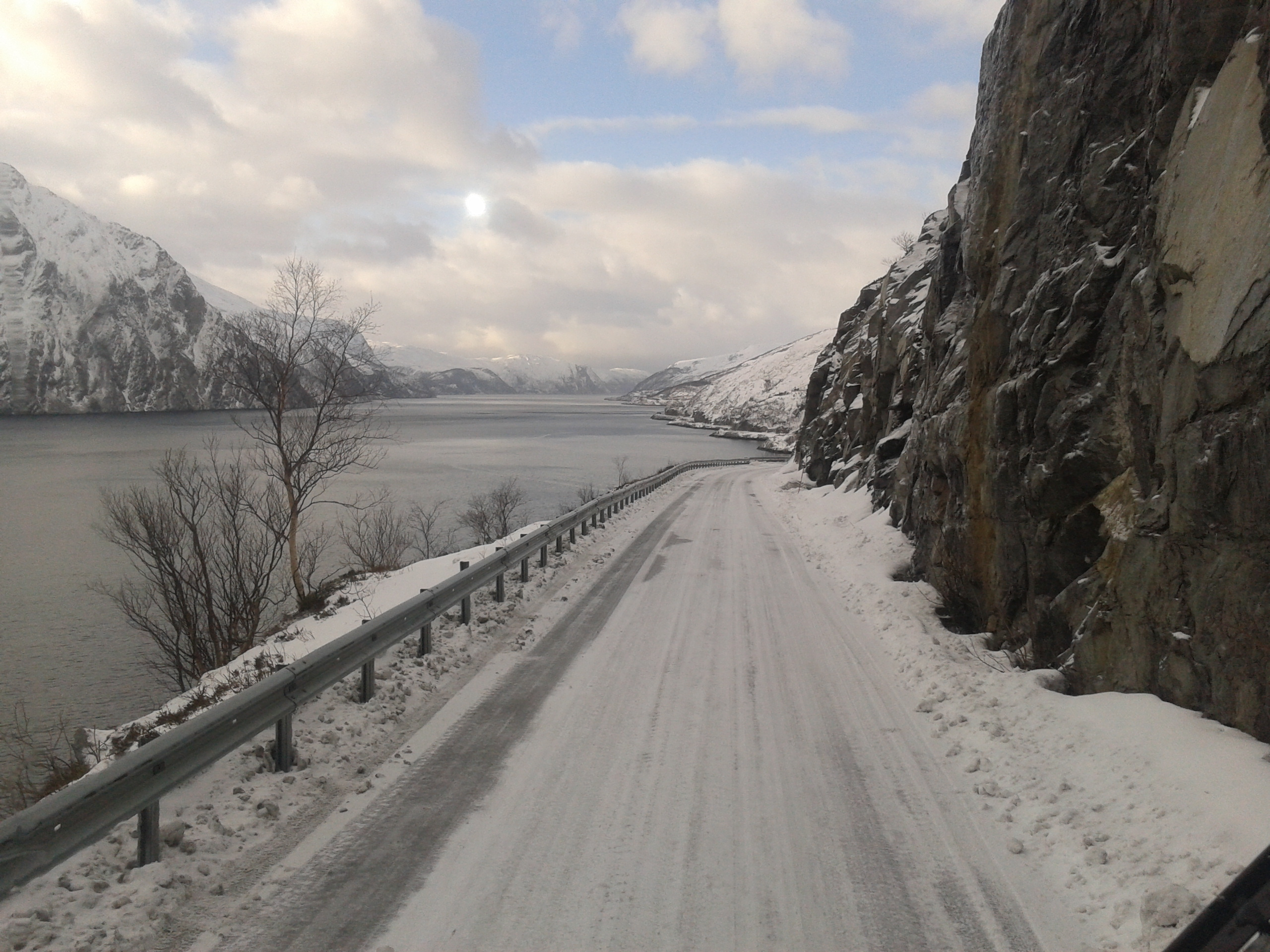 Tosen in Brønnøy and Bindalsfjorden, Norway